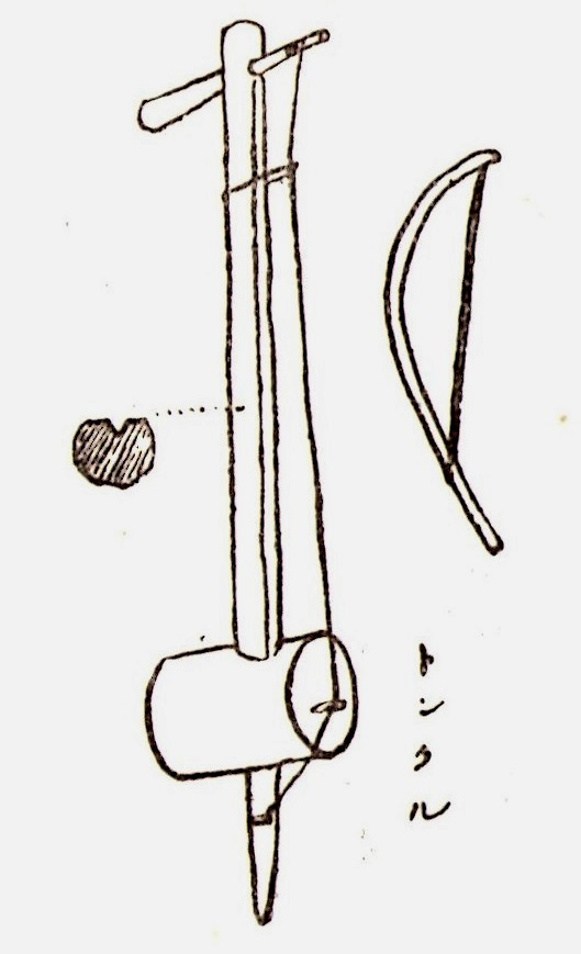 昭和2年刊行、田辺尚雄『島国の唄と踊』より